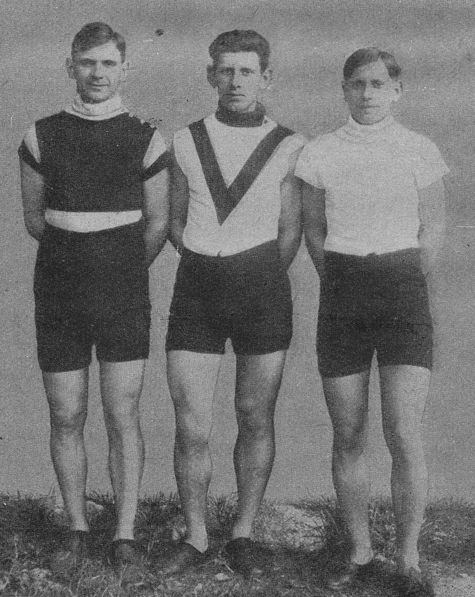 Gebrüder Suter, Radrennfahrer aus der Schweiz (v.l.n.r.): Paul, Max, Heinrich (Heiri)